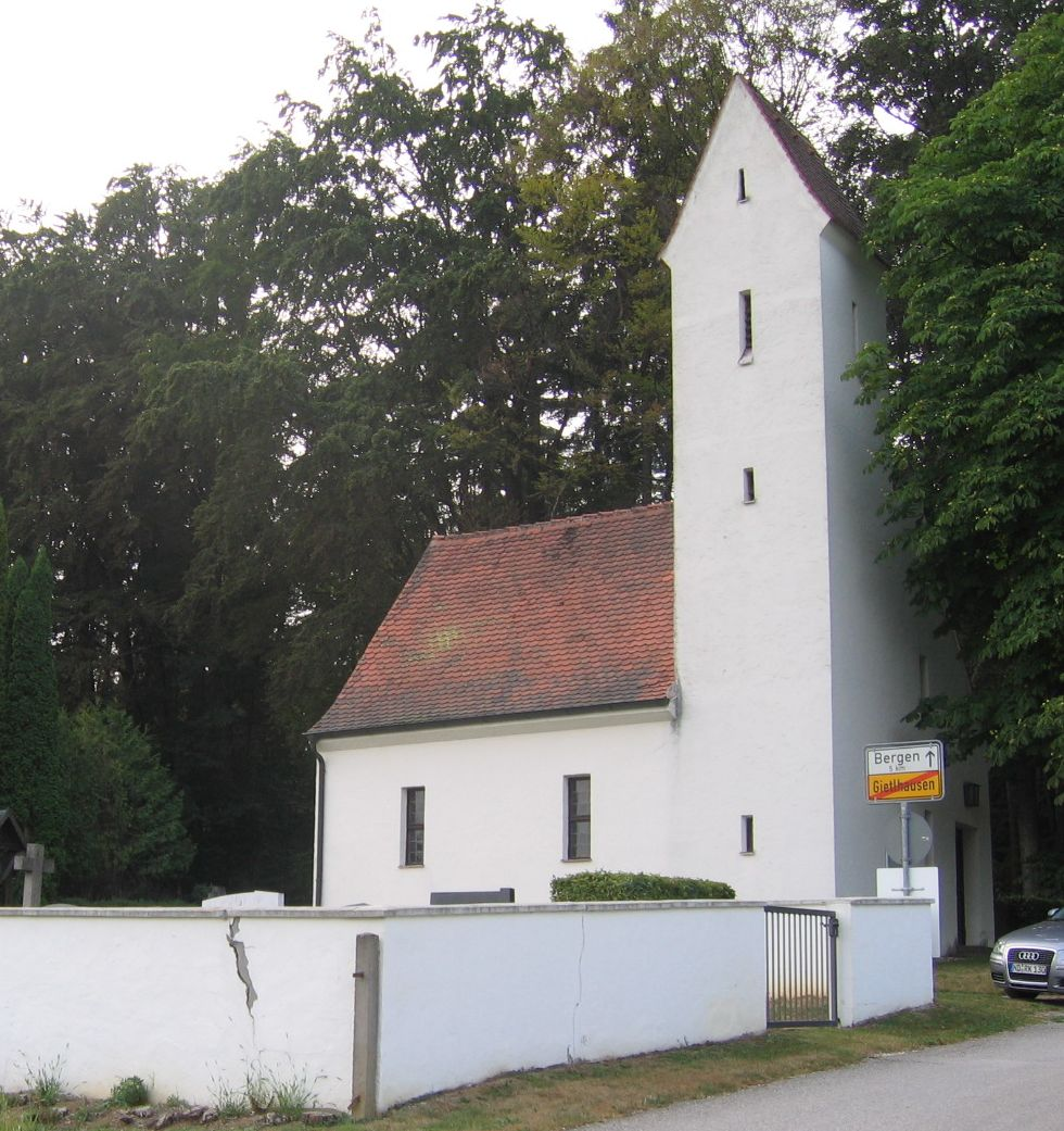 Das Kirchlein steht auf der Anhöhe und ist zum Wahrzeichen geworden.